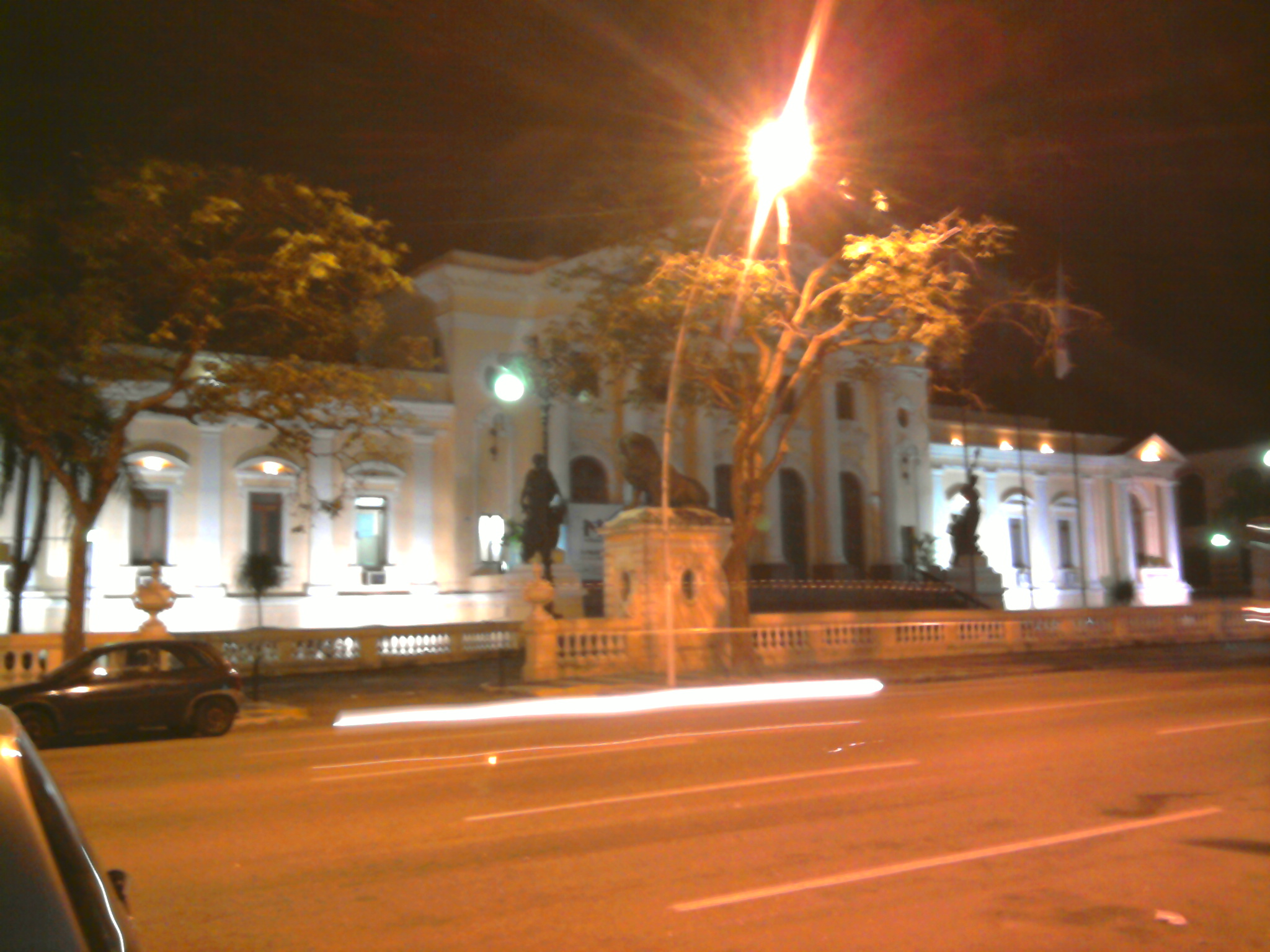 Antiga sede da Assembleia Legislativa do Rio de Janeiro, situada na Praça da República em Niterói, inaugurada em 1917. Atualmente abriga a Câmara Municipal de Niterói